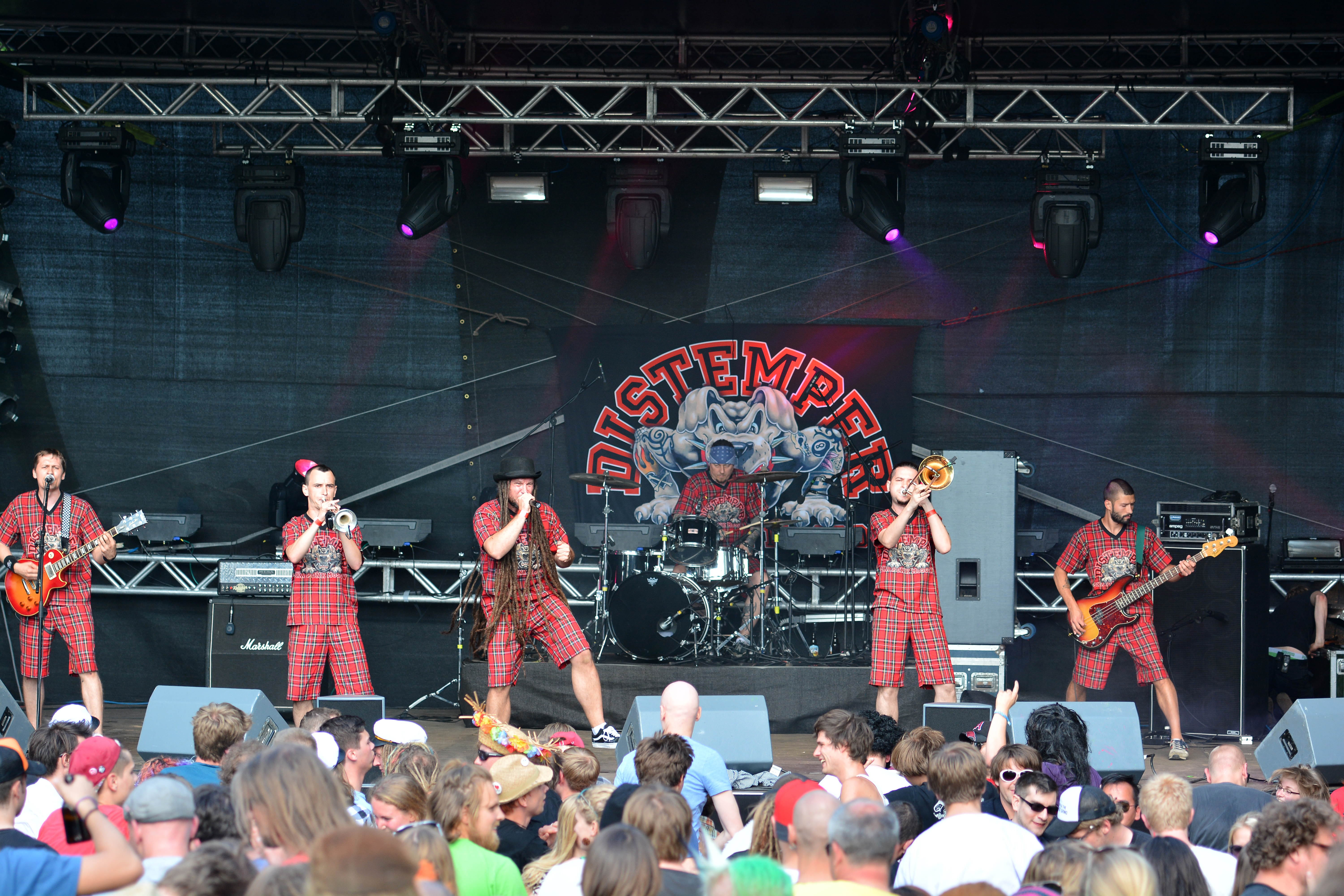 Distemper beim Wilwarin Festival 2014